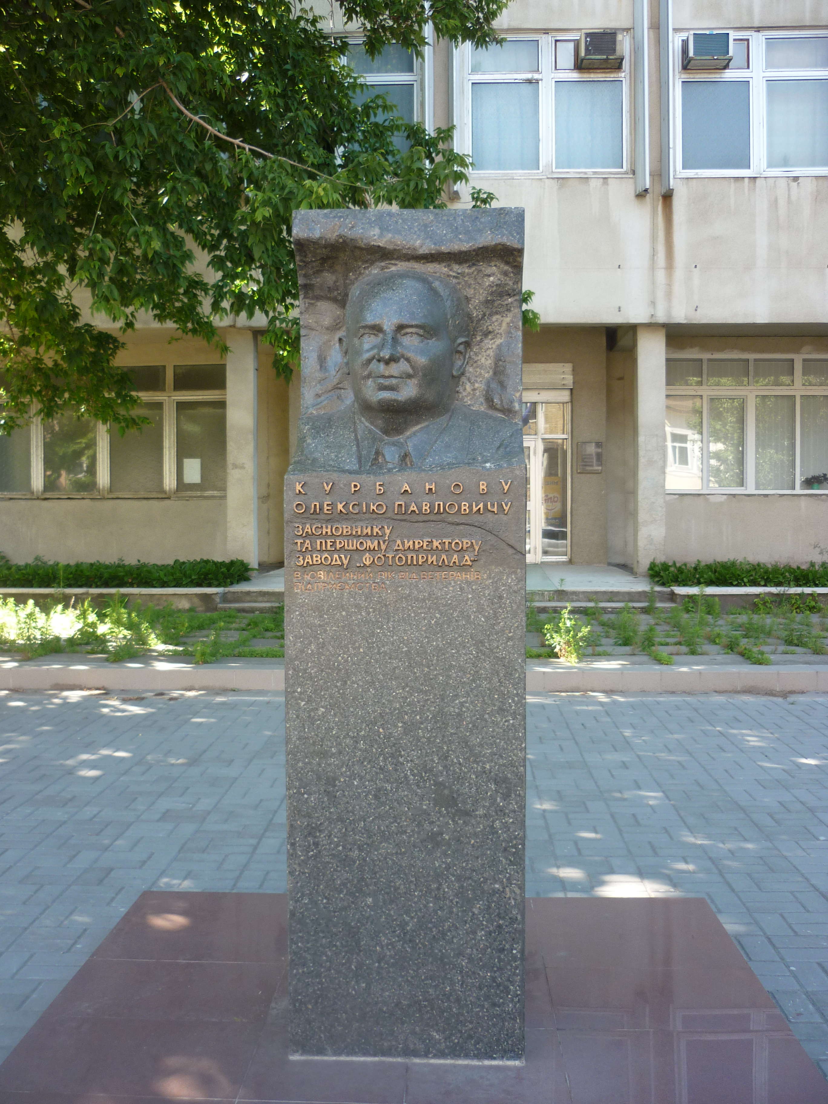 Пам'ятник Курбанову Олексію Павловичу, засновнику НВК "Фотоприлад"